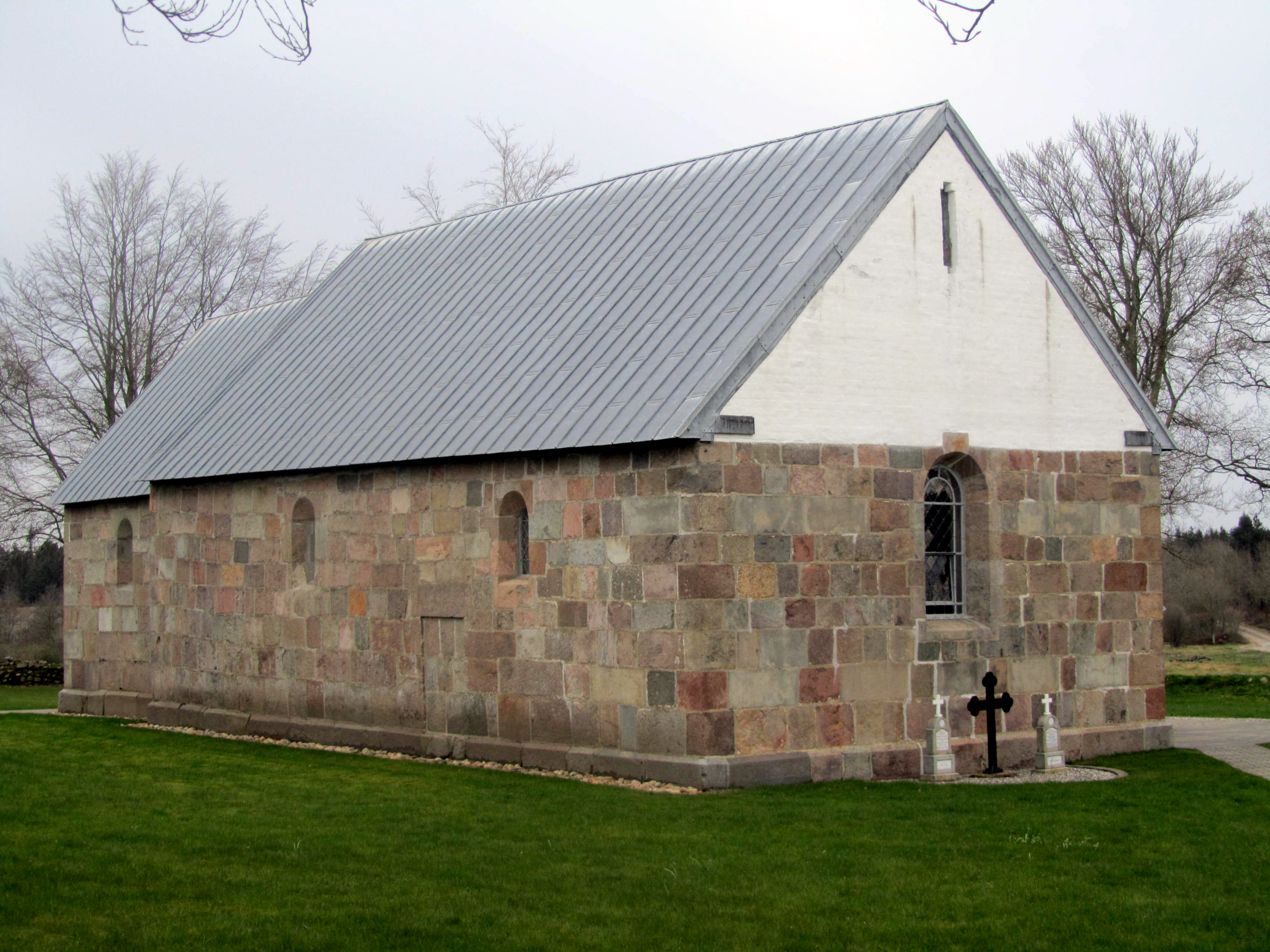 Arnborg Kirke set fra nordvest